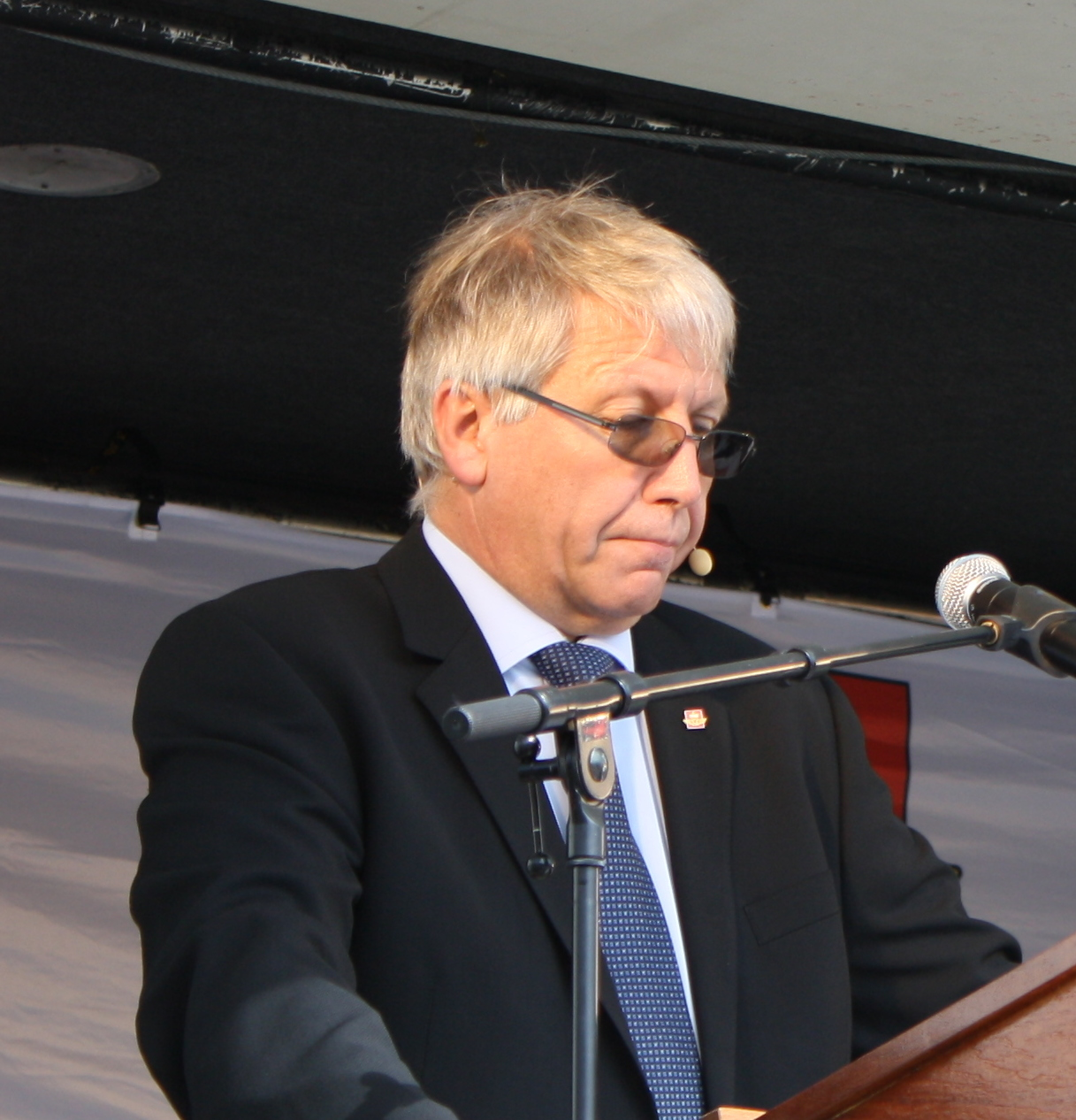 Vegdirektør Terje Moe Gustavsen holder tale i forbindelse med åpningen av Nordre avlastningsveg.